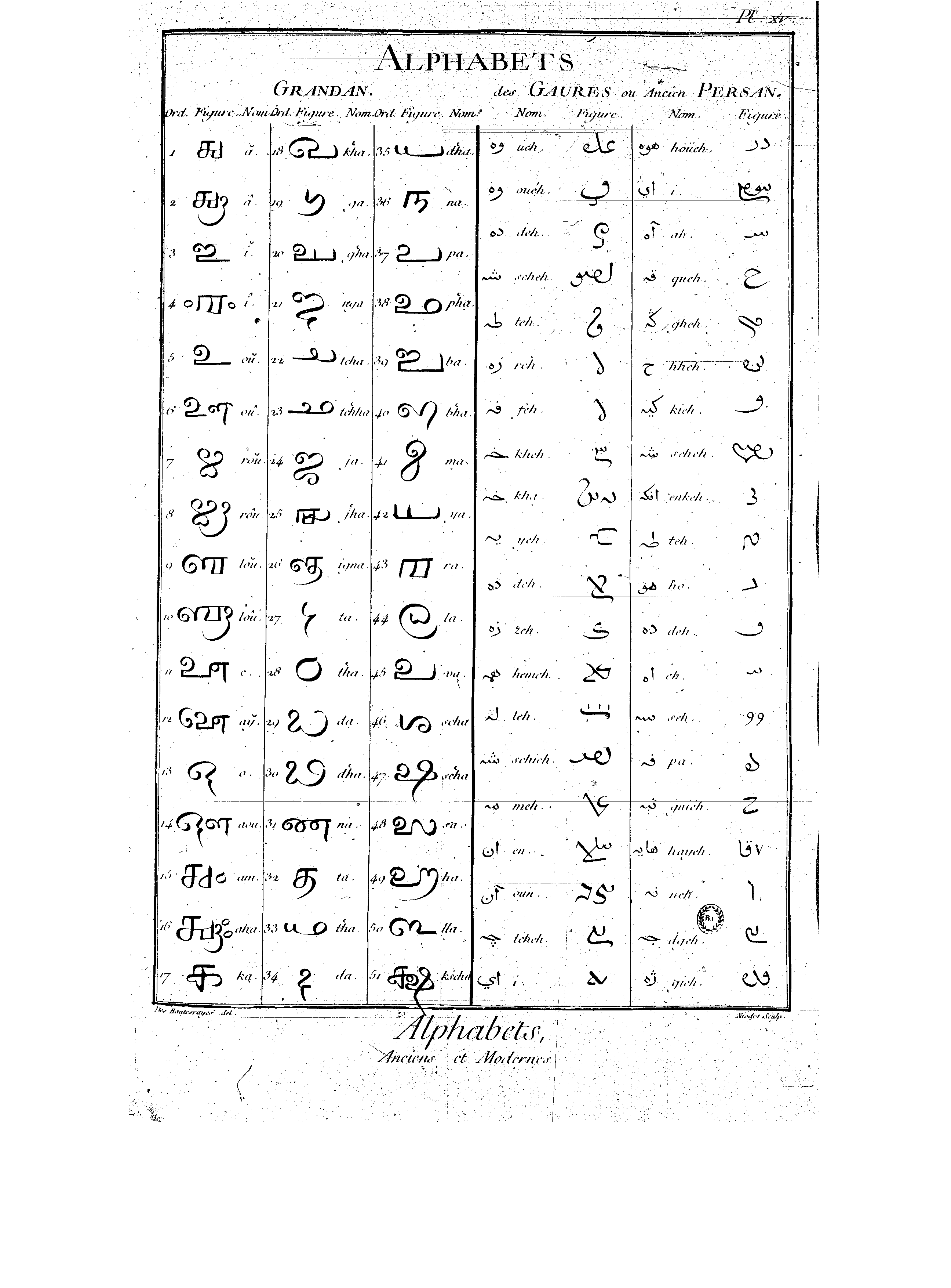 Planches de l'Encyclopédie de Diderot et d'Alembert, volume 2